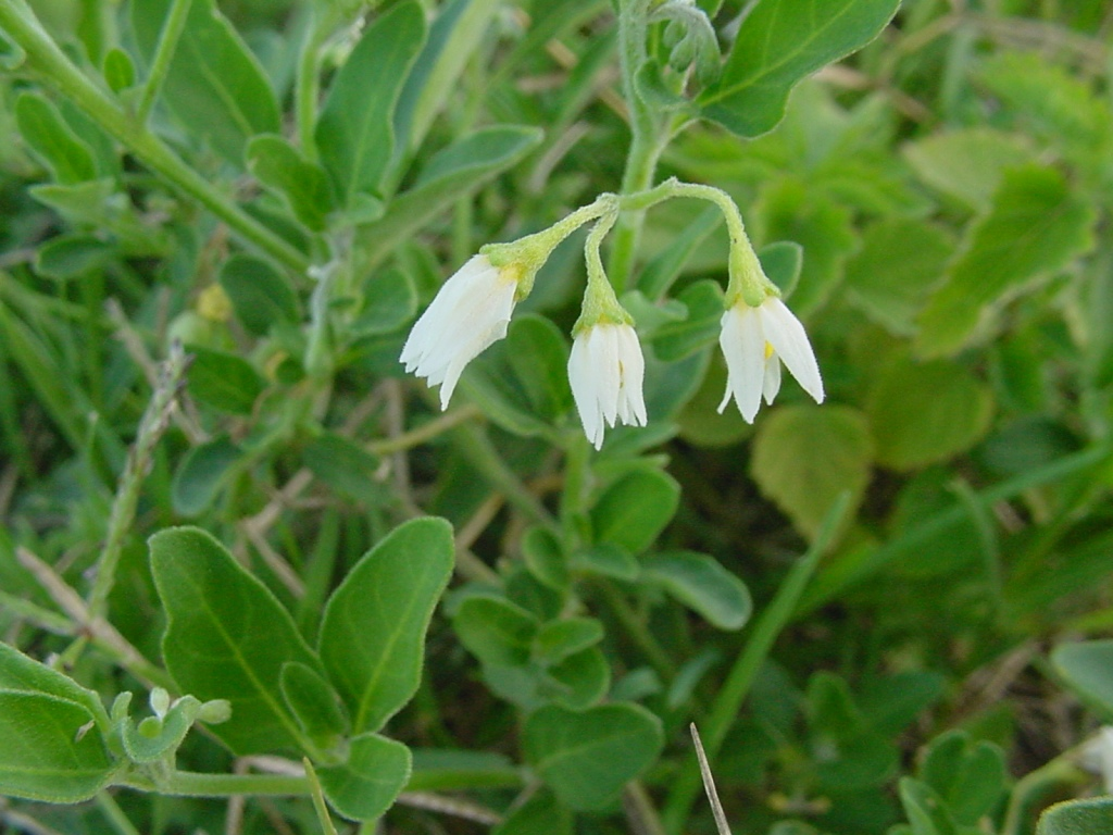 Salpichroa origanifolia - SOLANACEAE - Esta��o Ecol�gica do Taim - RS - Brasil